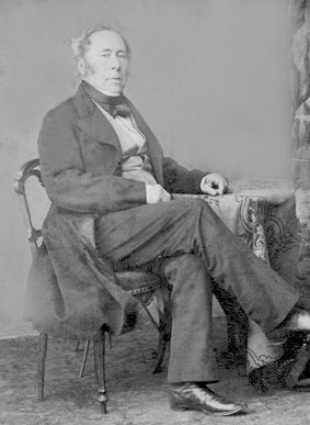 Jonkheer Eduardus Johannes Petrus van Meeuwen